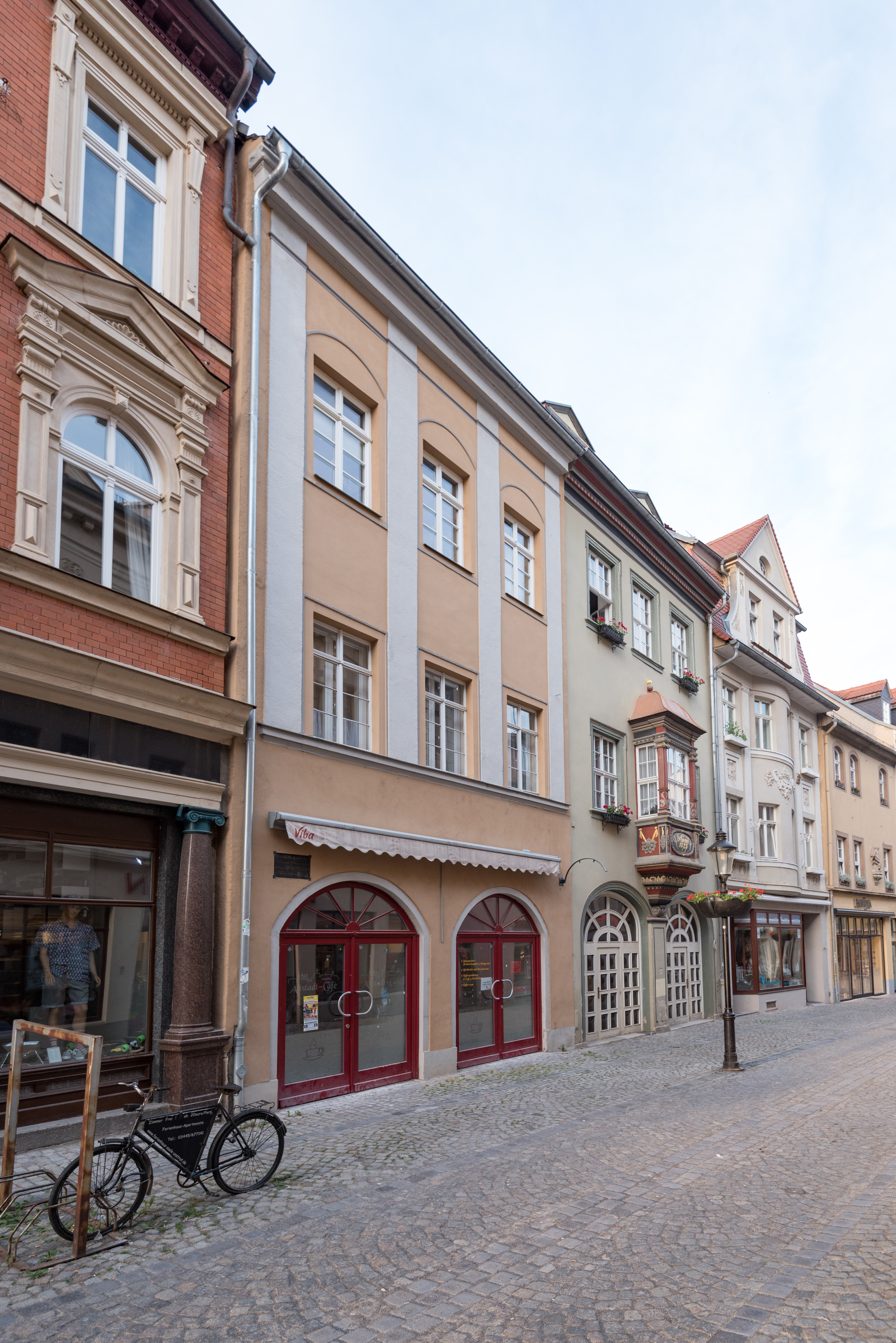 Naumburg (Saale), Herrenstraße 9